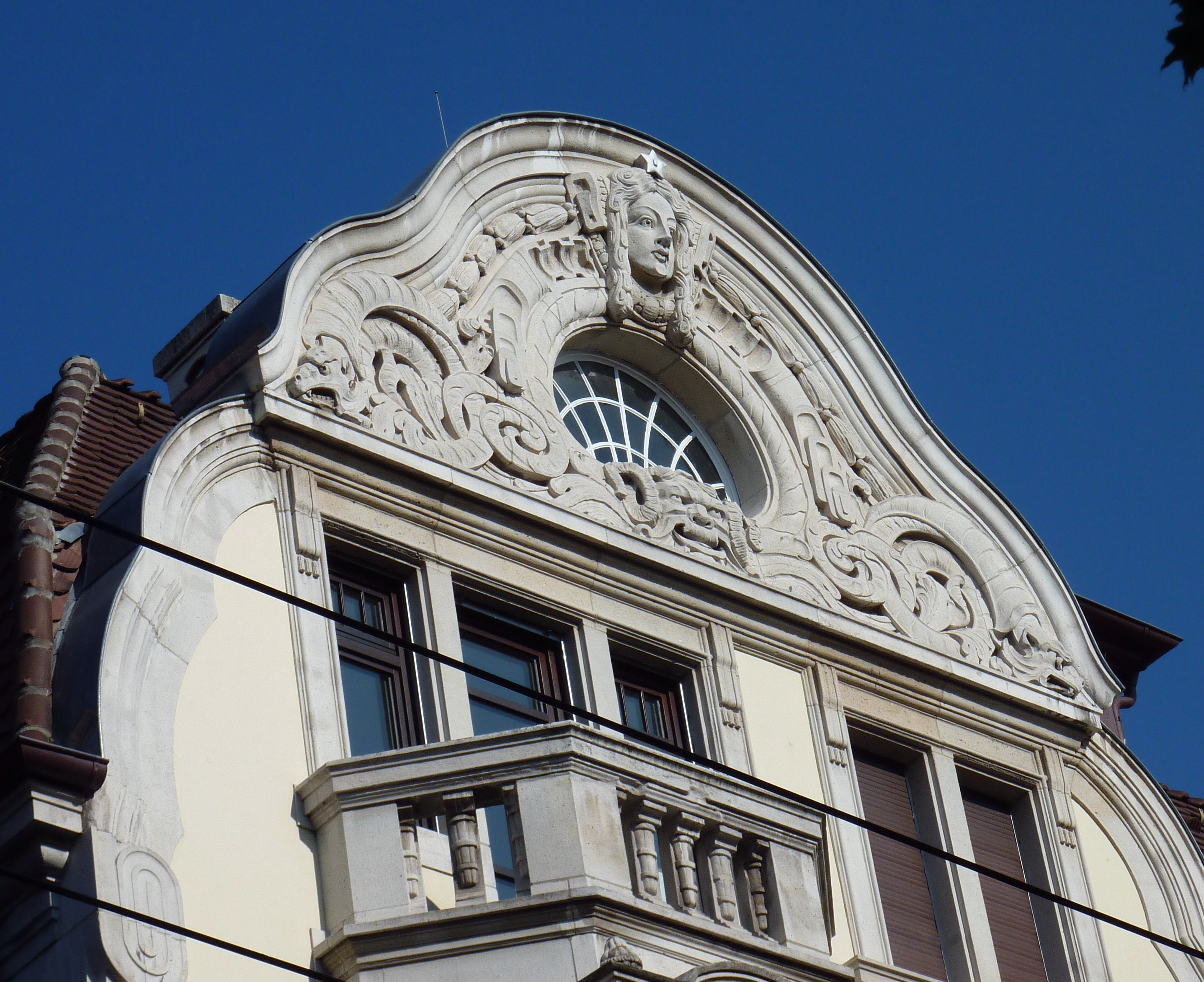 Giebel, Neckarstr. 65, Esslingen